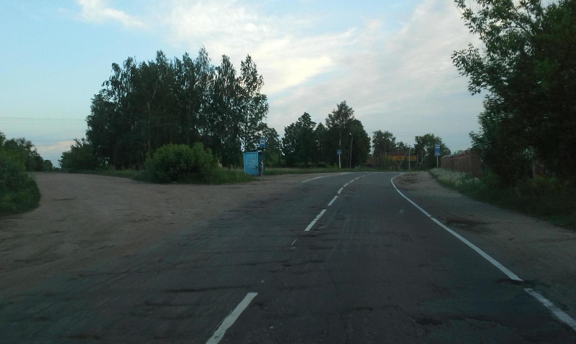 Октябрьская улица, Кибергино